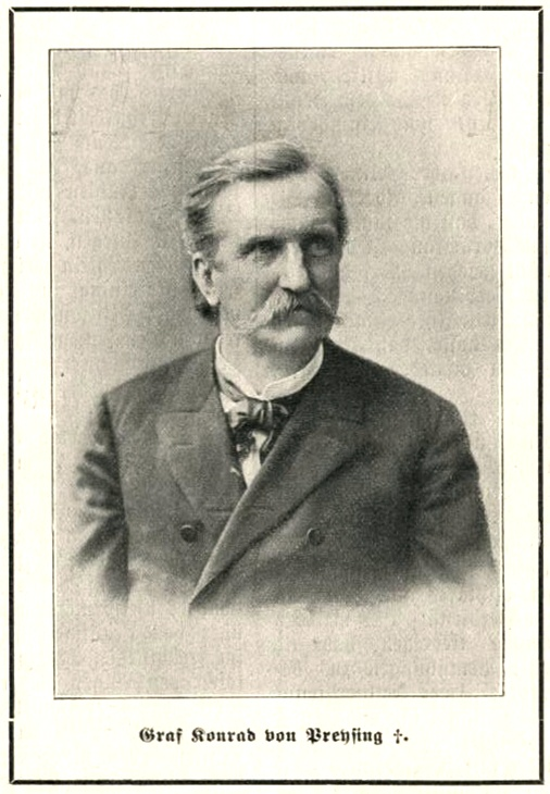 Graf Conrad von Preysing (1843-1903) Reichstagsabgeordneter, Zentrum